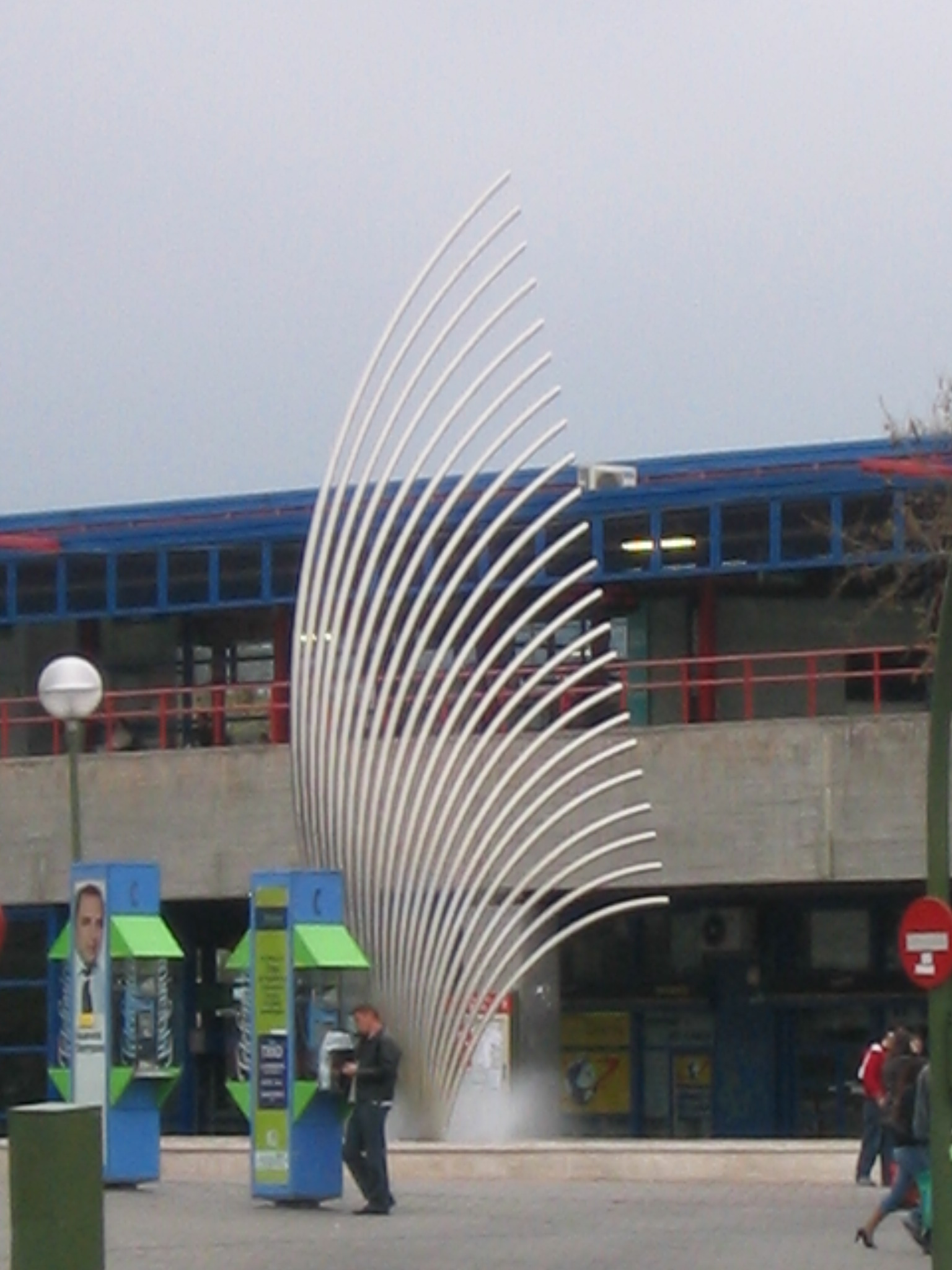 Escultura metálica junto al intercambiador de Aluche en Madrid (España).